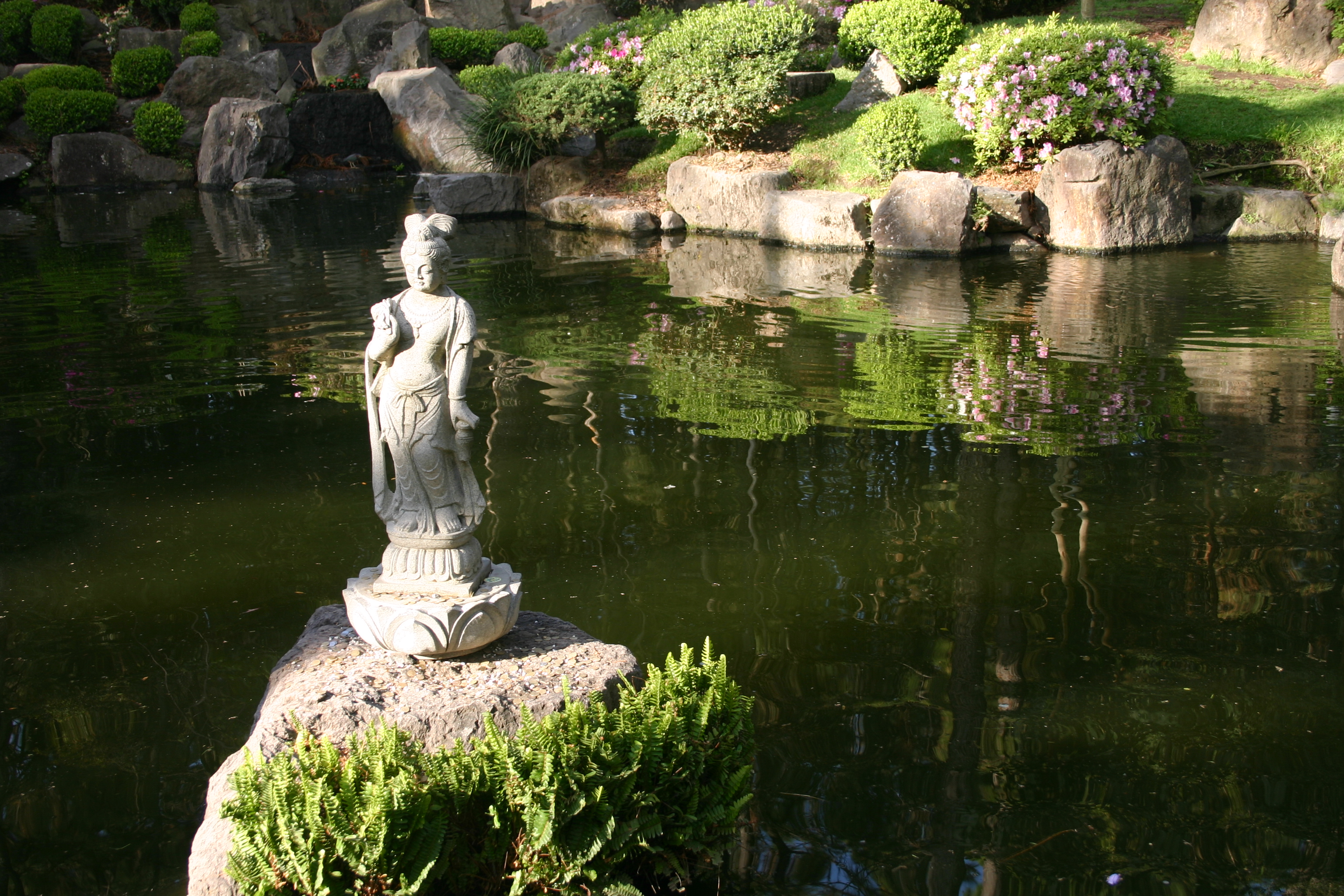 Jardín japones en una mañana de febrero.